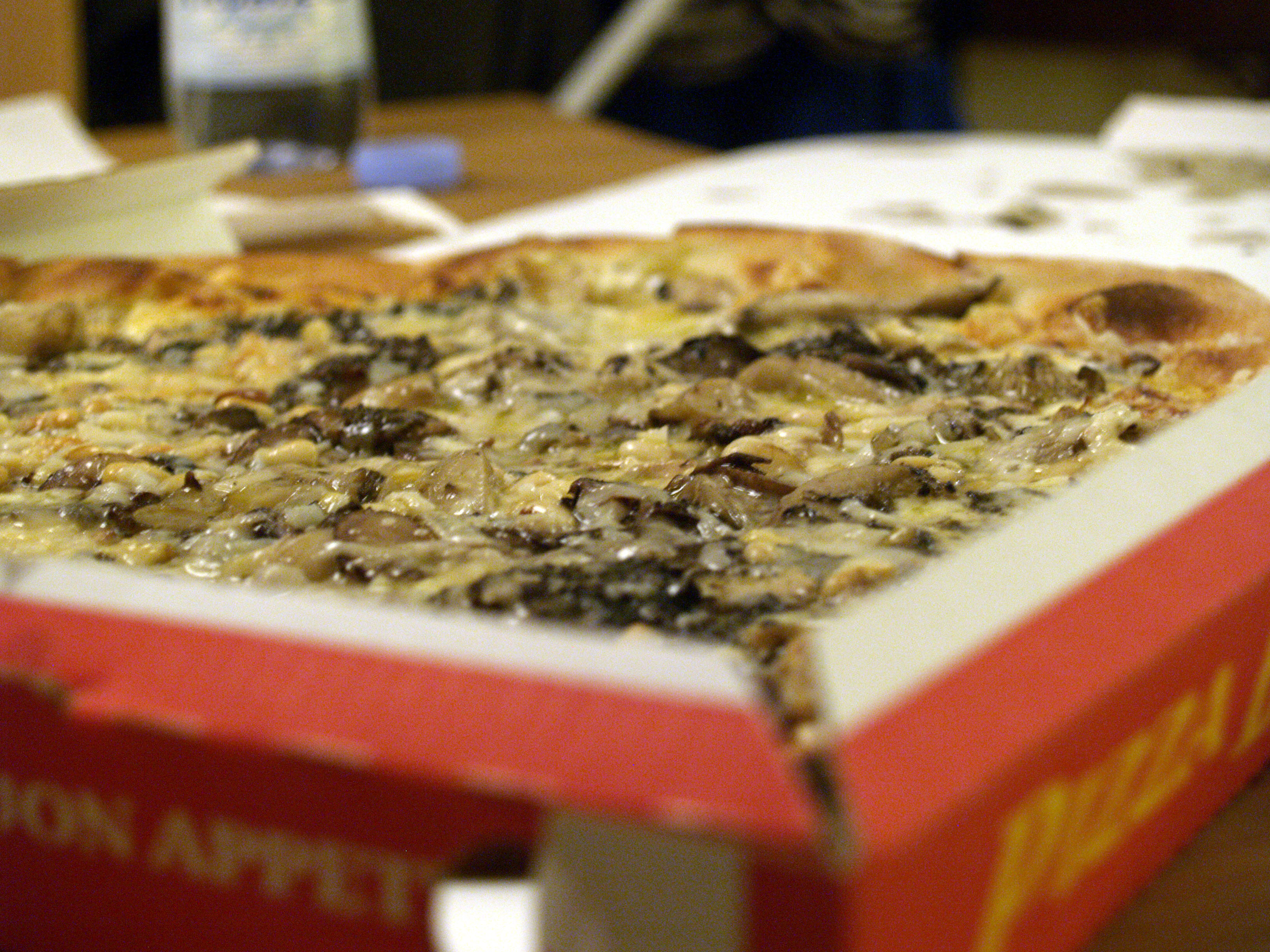 Pizza med fire slags svampe, trøffelolie og pinjekerner